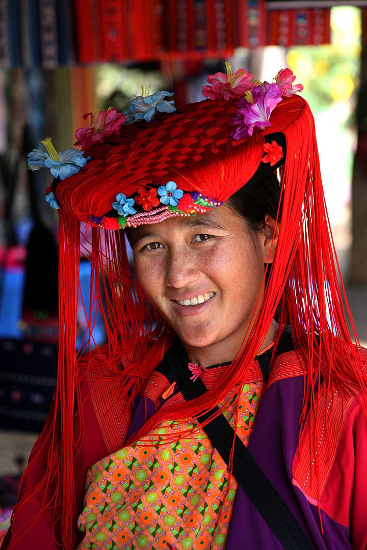 Lisu woman